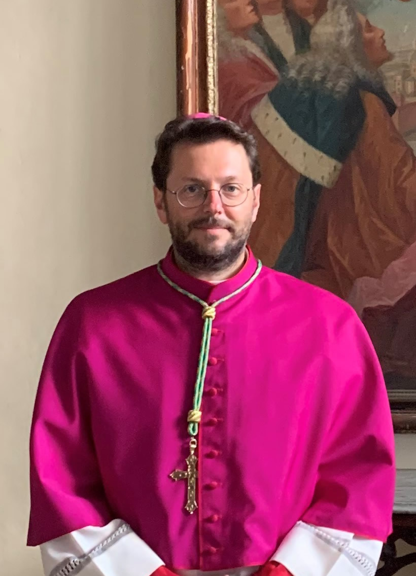 S.E.R. Mons. Giorgio Marengo